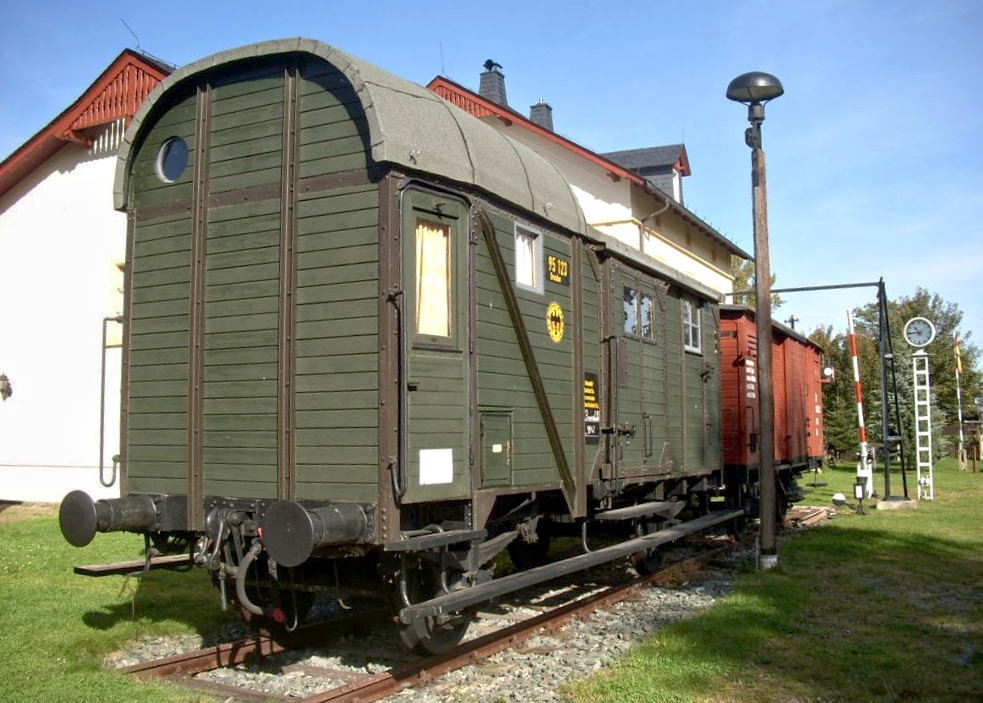 preußischer Güterzuggepäckwagen aus der Waggonfabrik Dessau von 1920.